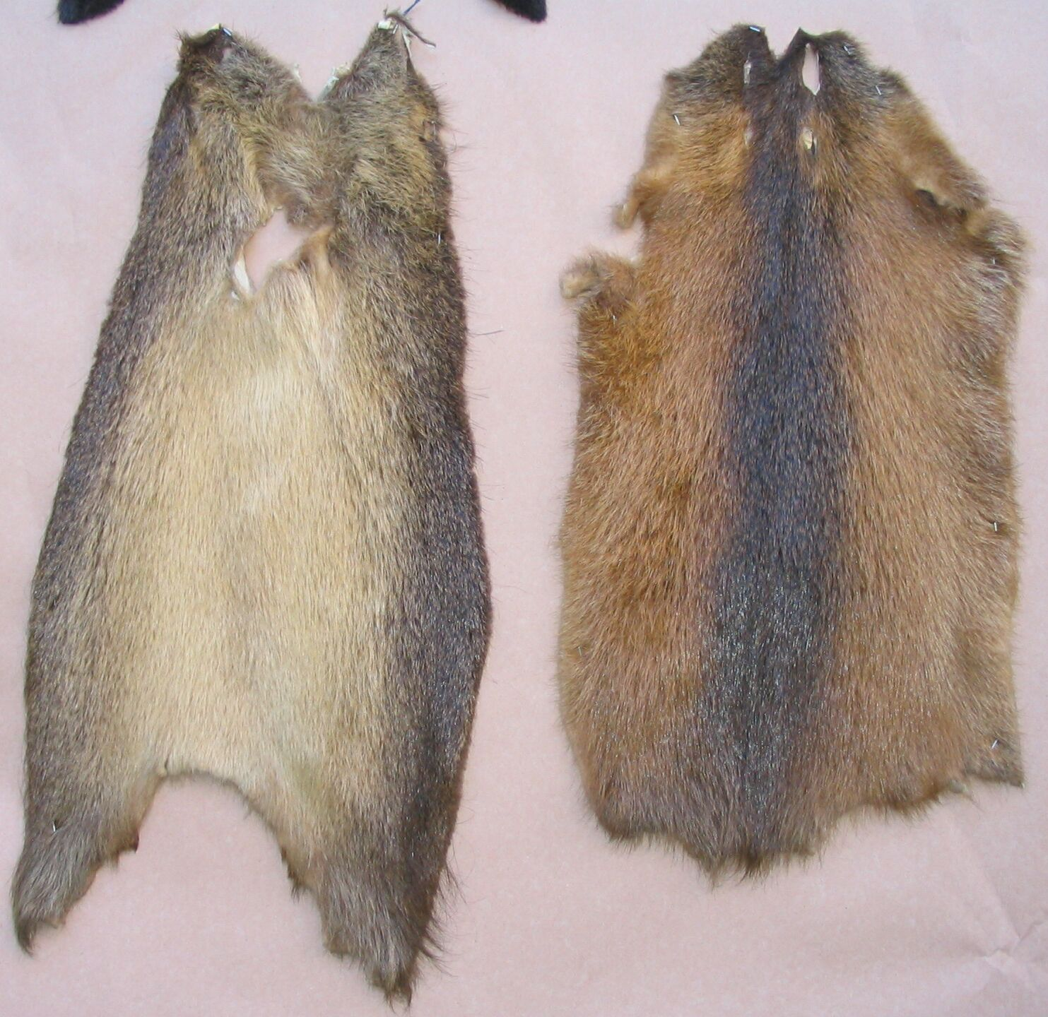 Nutria skins, high sheared / Nutria, angeschorene Grannen (sogenannte Spitznutria). Linkes Fell im Rücken, rechts in der Wamme aufgeschnitten. Jeweils Naturfarbe. Aus ca. 1983, Provenienz unbekannt.